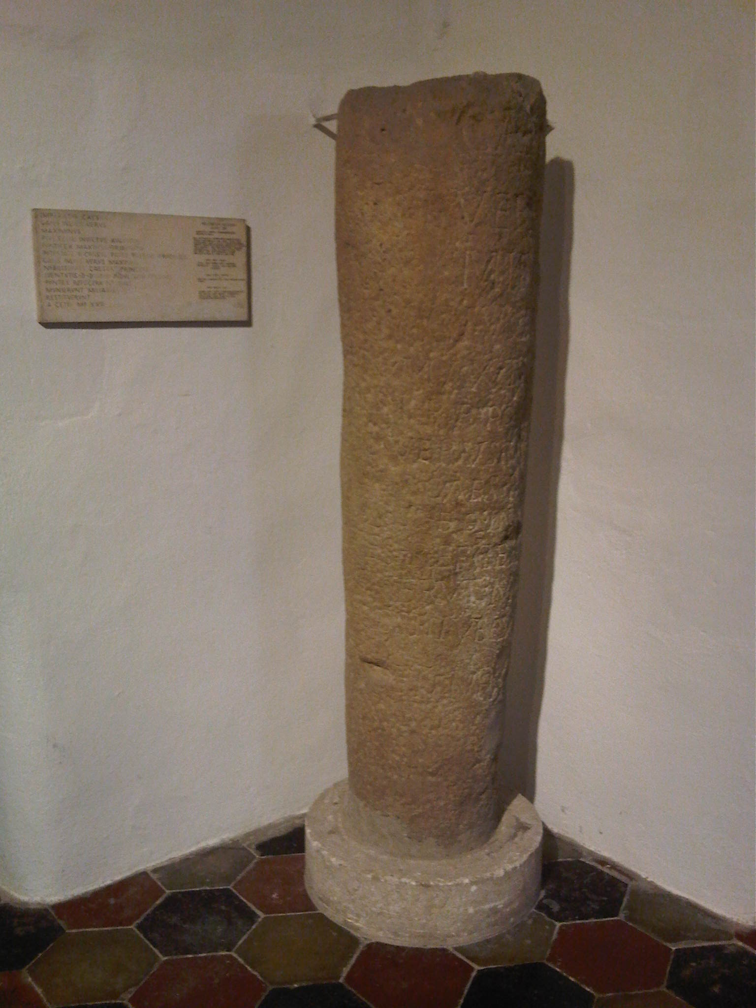 Meilenstein, entdeckt in der Tullner Kirchengasse 10, aufgestellt in der Vorhalle der Pfarrkirche St. Jakob in Königstetten